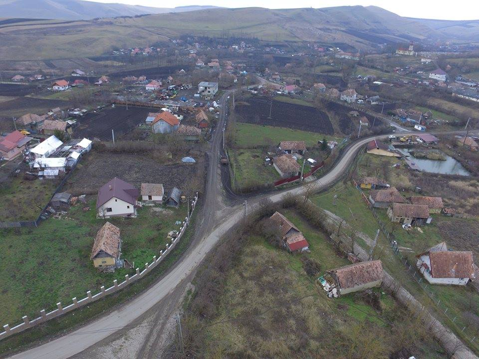 Imagine din Aruncuta,jud.Cluj - vedere nord { vest } - sud { est } . Arhiva fam.Vilt Eugen